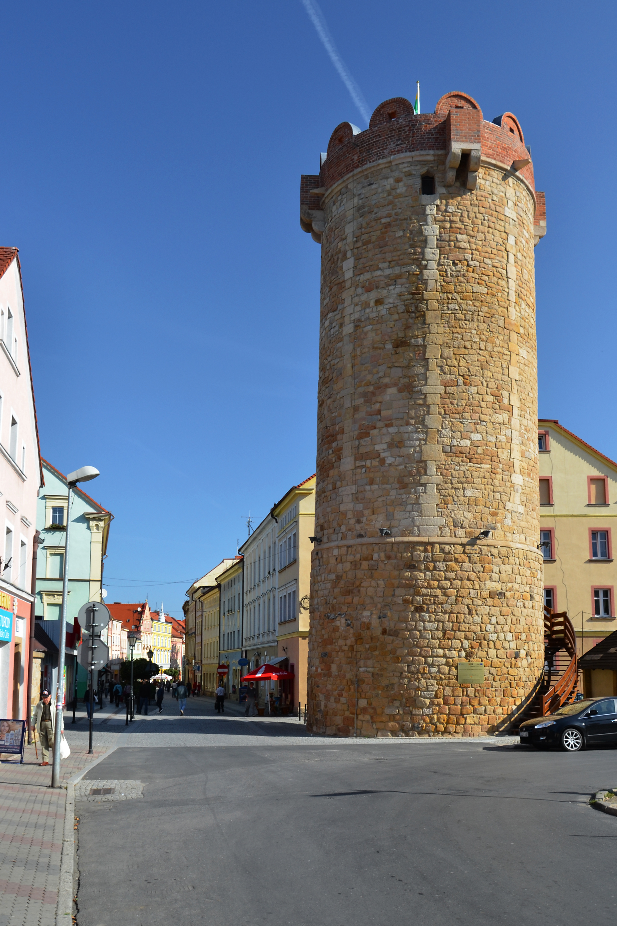 Złotoryja, ul. Basztowa - baszta obronna, tzw. Kowalska, XIV, XVI w. (zabytek nr 334 z 6.11.1956)